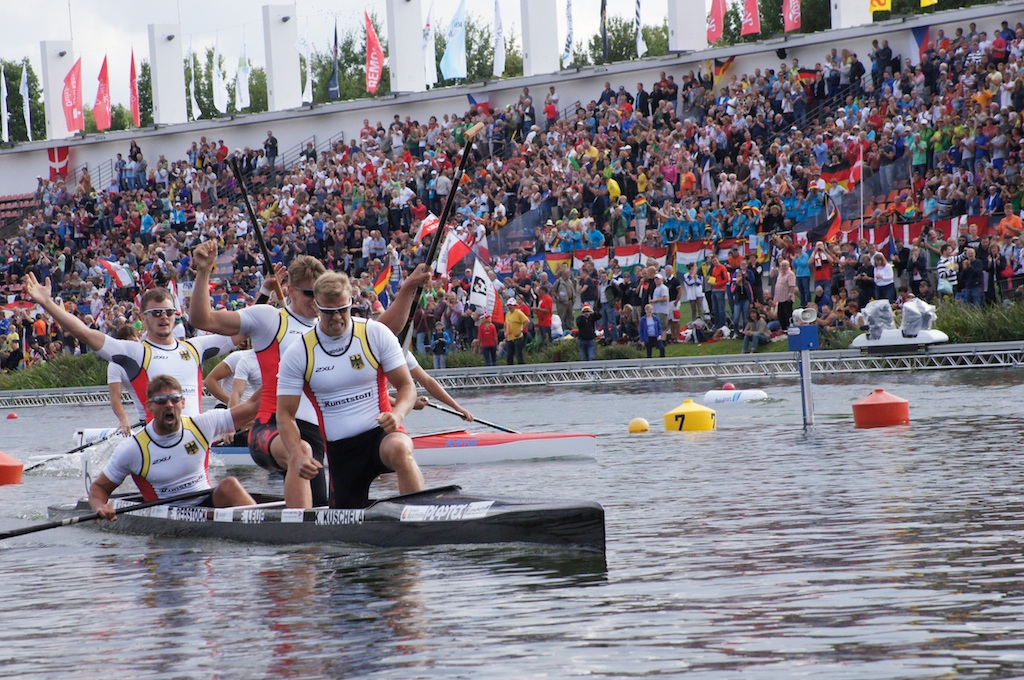 1000m C4 Final Kanu-WM 2013